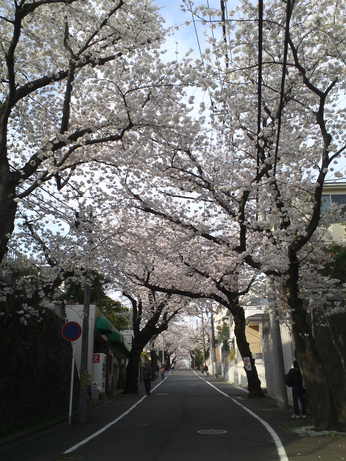 桜ケ丘の桜並木（神奈川県横浜市保土ケ谷区）